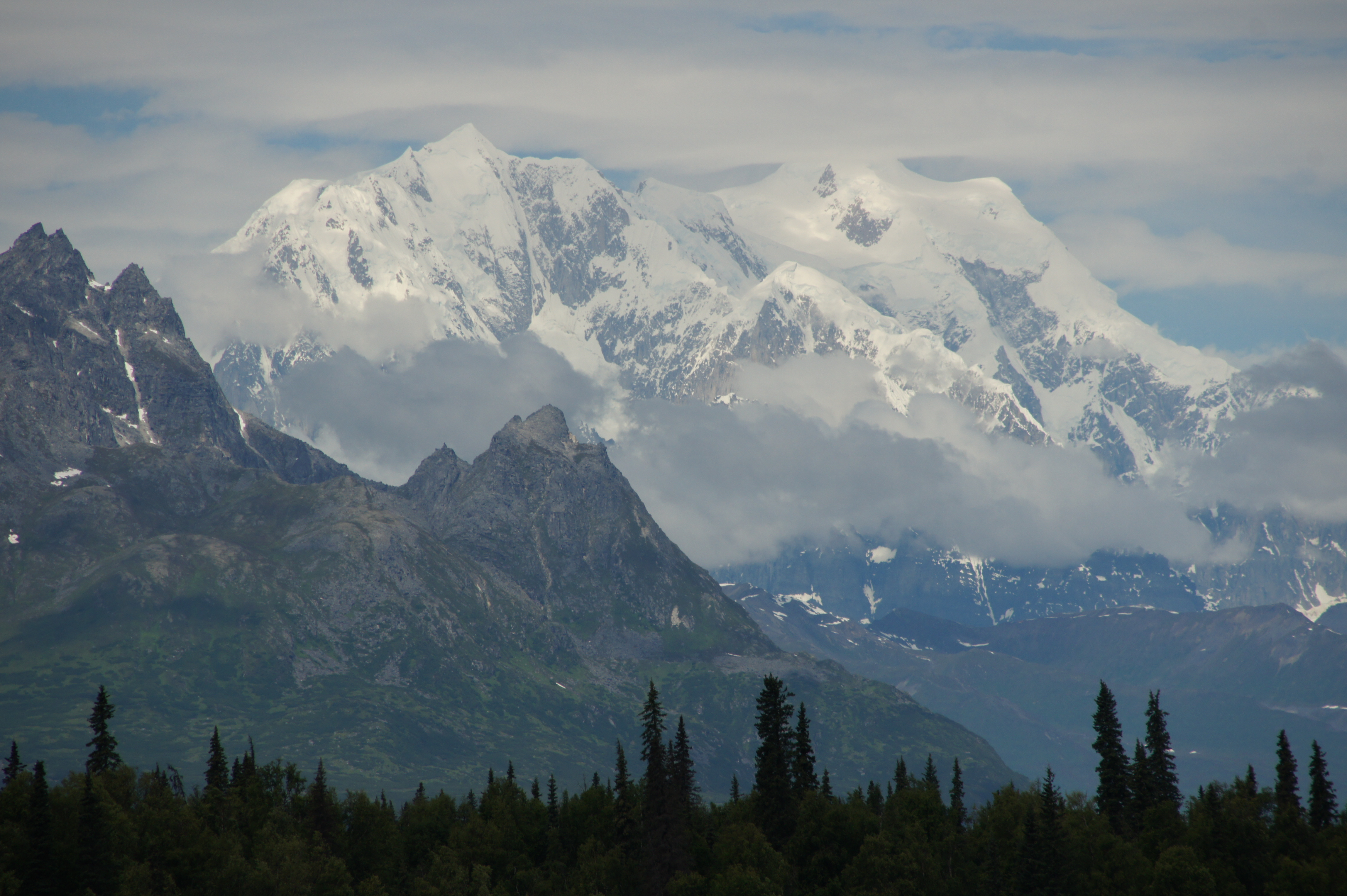 Mount Hunter, Alaska